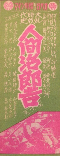 『人間治郎吉』、1927年公開時のフライヤー